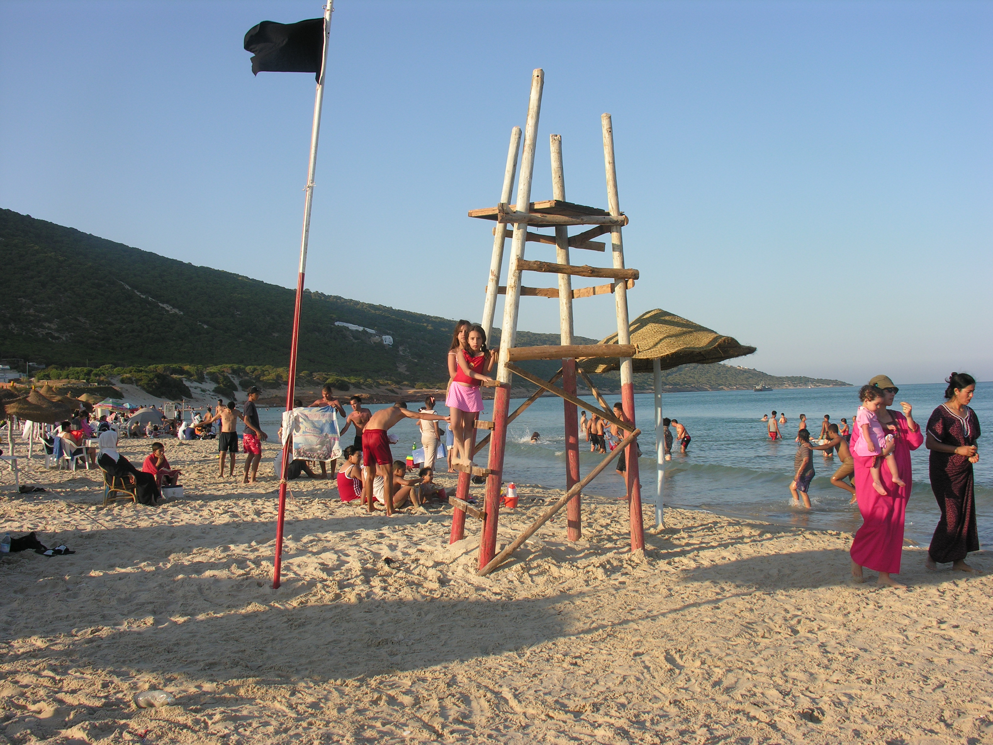 Plage de Sidi Ali El Mekki, un jour de l'été 2006